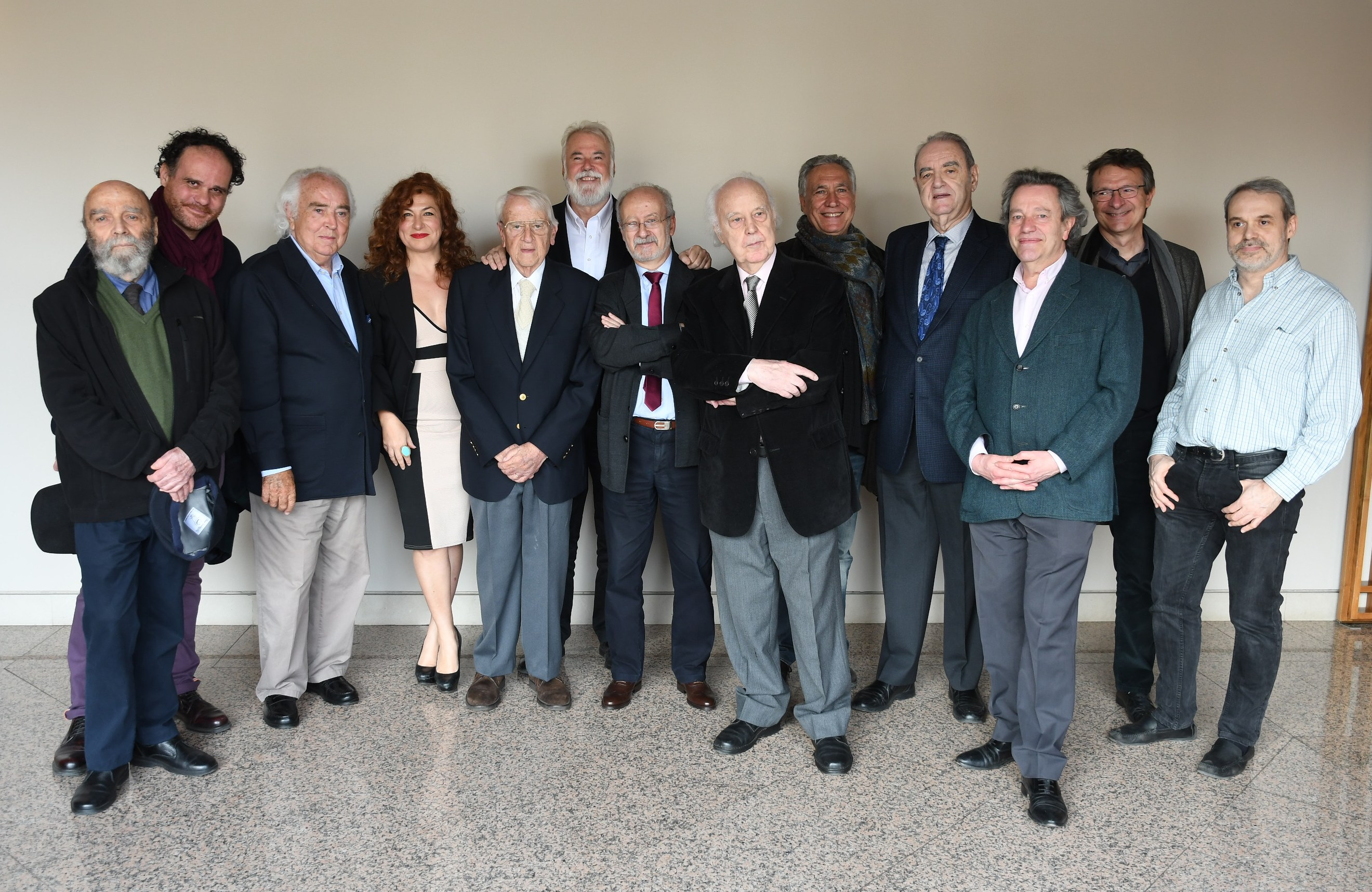 Compositores españoles (de izq. a der.); de Pablo, Zárate, Garcia Abril, Jurado, Halffter, Turina, Acilu, Parera, Marco, Encinar, Aracil, del Puerto.